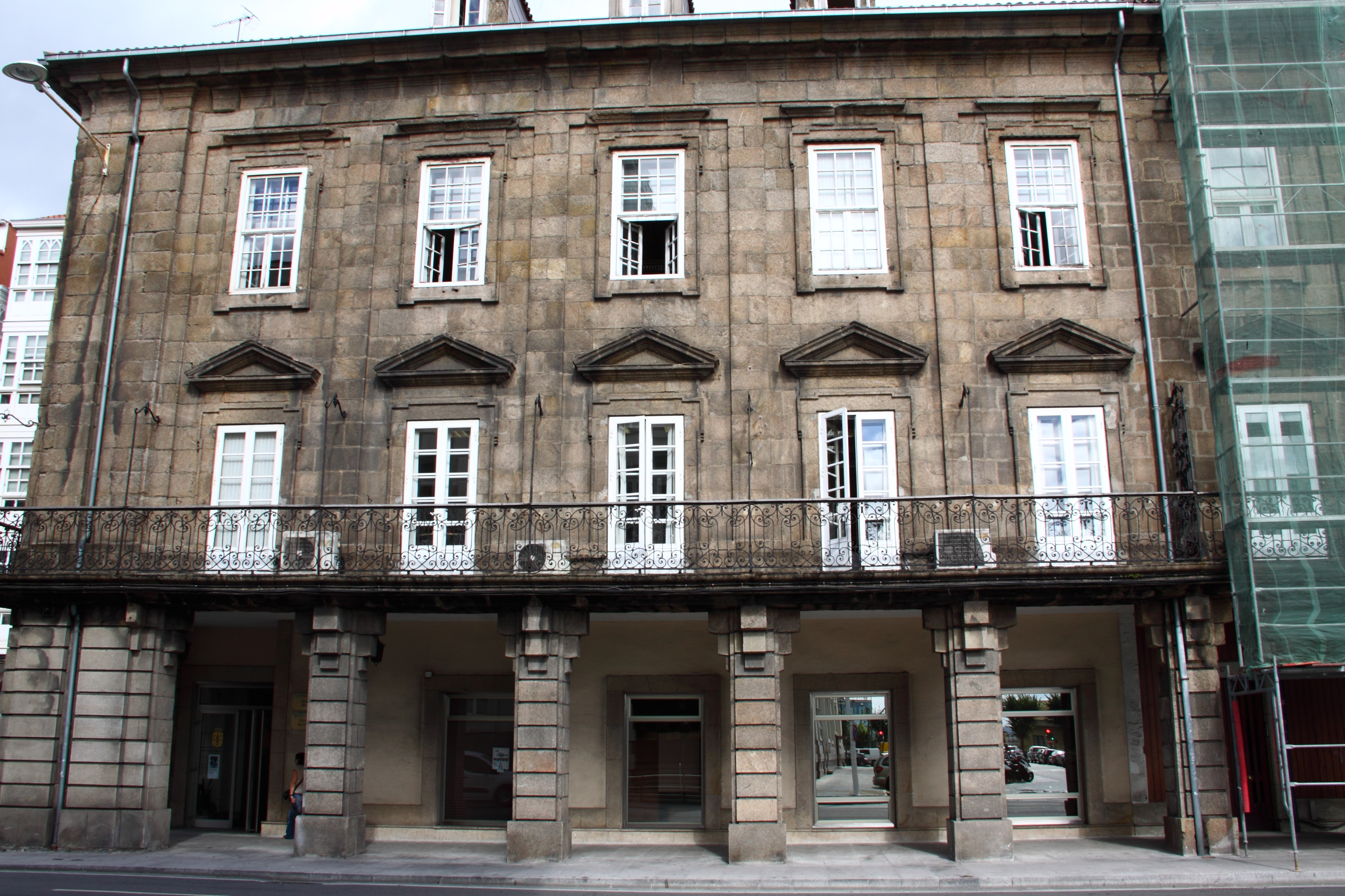 Casa Paredes, A Coruña